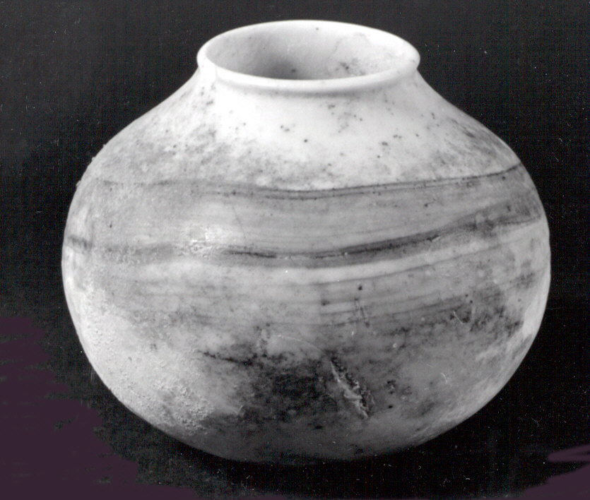 Jar; Stone-Vessels